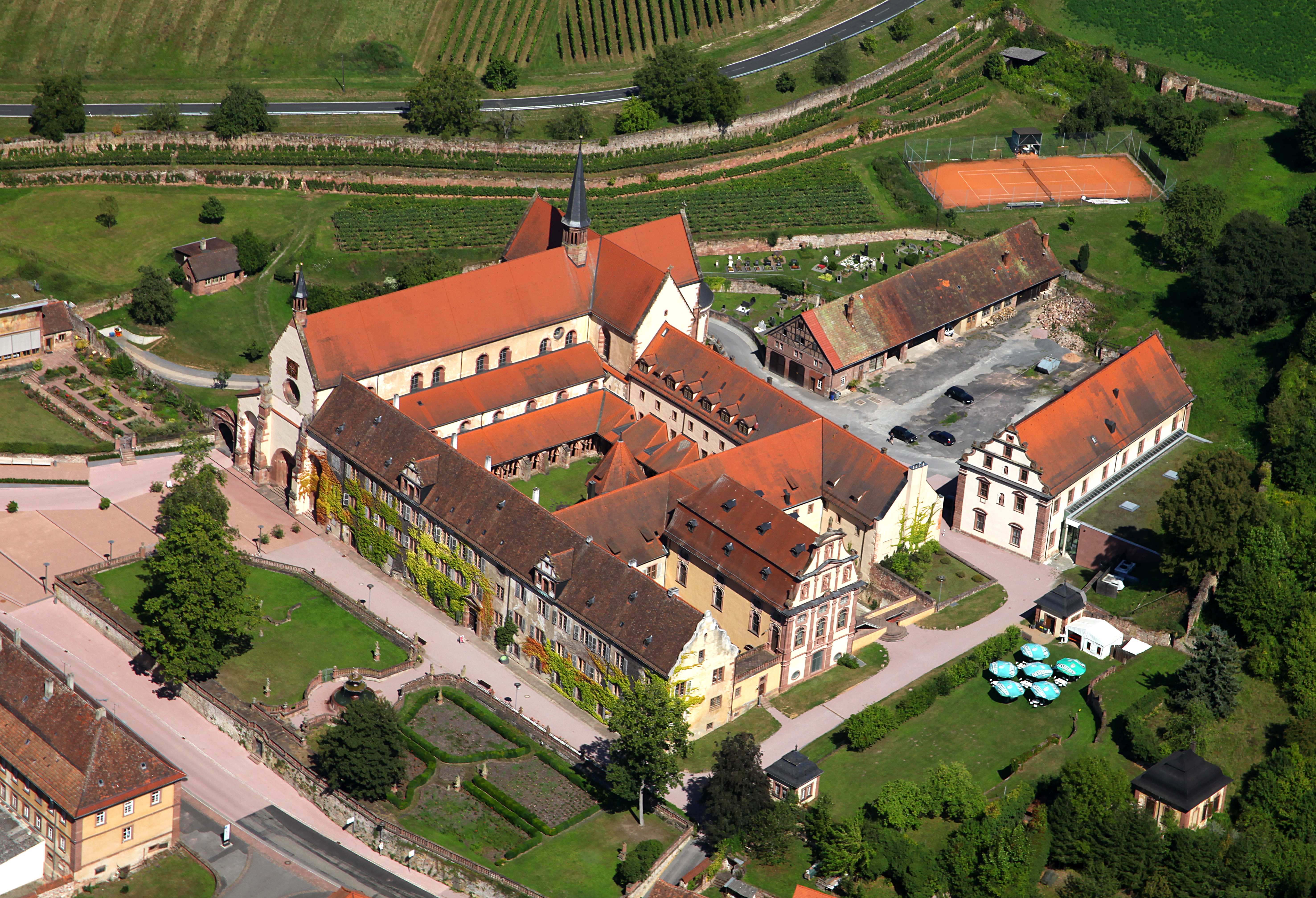 Kloster Bronnbach im Taubertal